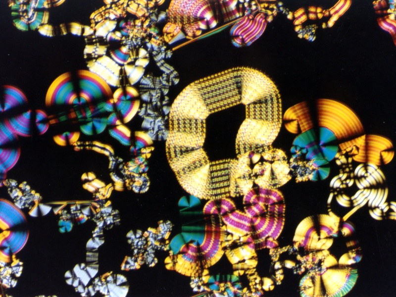 Polarisationsmikroskopische Aufnahme einer sogenannten B7-Phase von bent-core („bananenförmigen“) Mesogenen; charakteristische Textur 1, Flüssigkristall.